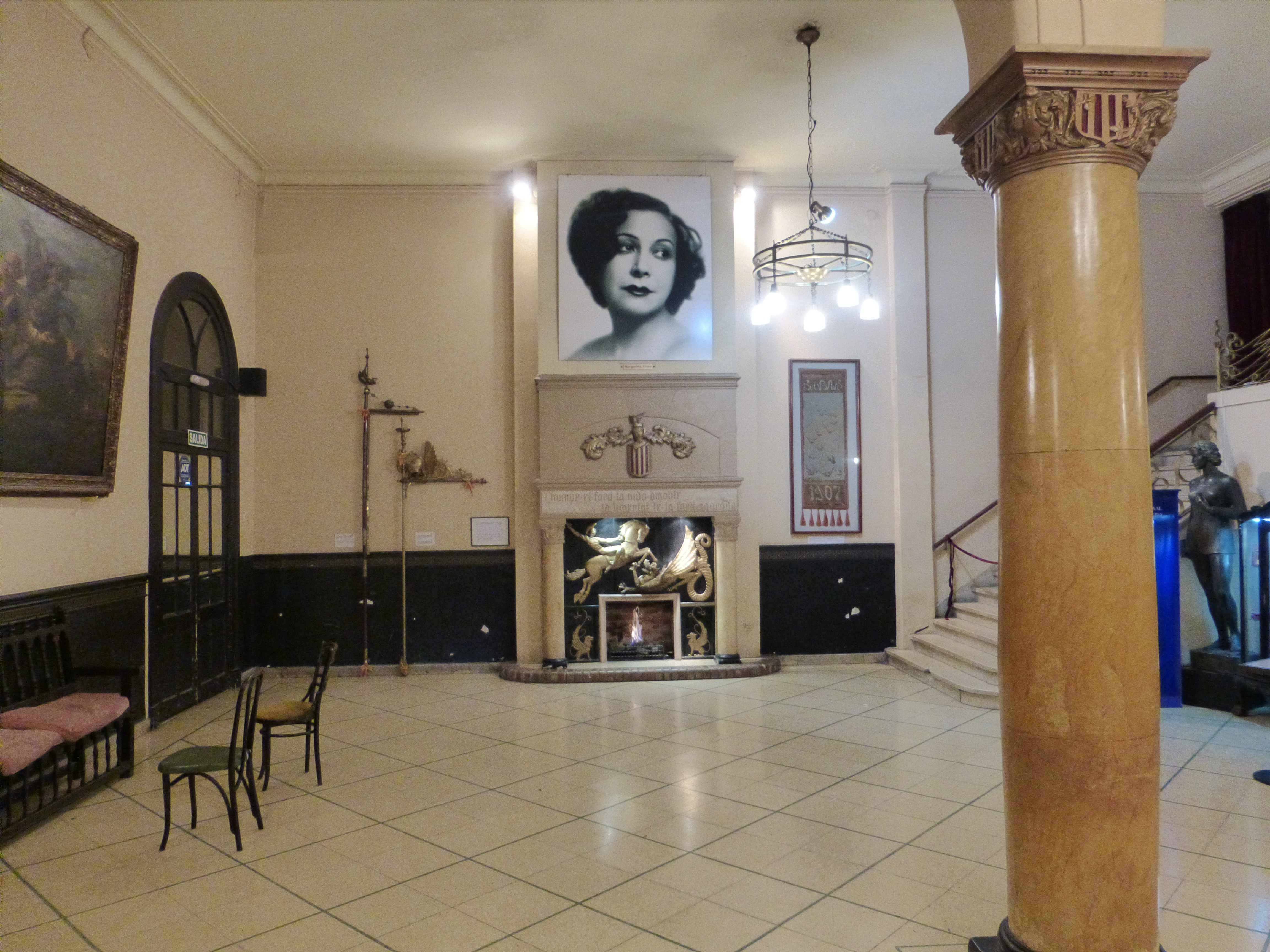 Vestíbulo del Casal de Catalunya, ubicado en el barrio porteño de San Telmo.